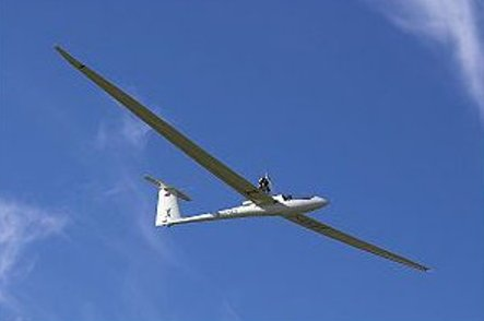 Nimbus-4T, lajstromjele: HA-3176, farokjele: XX